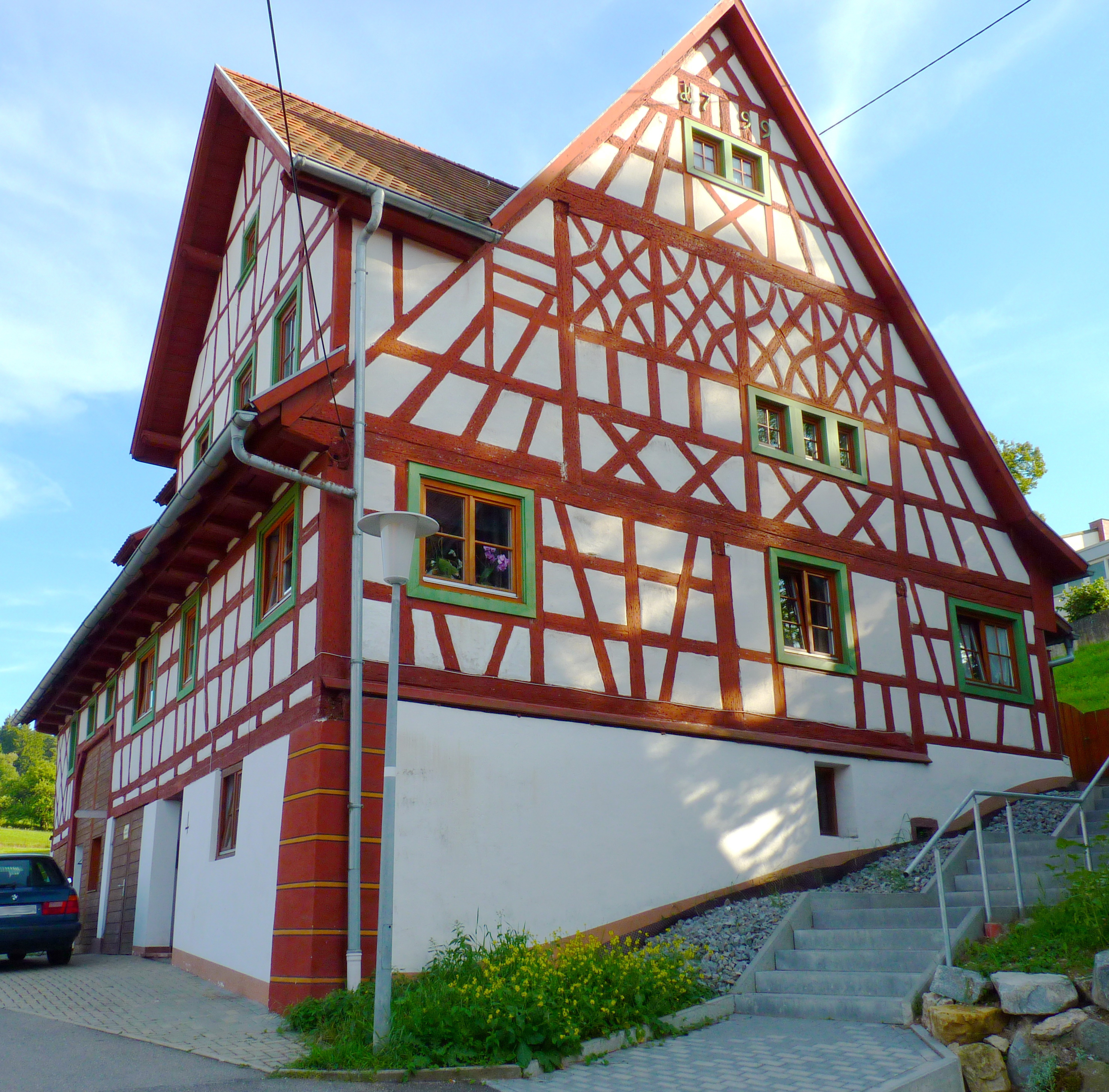 Gässle 4, Zimmern-Flözlingen